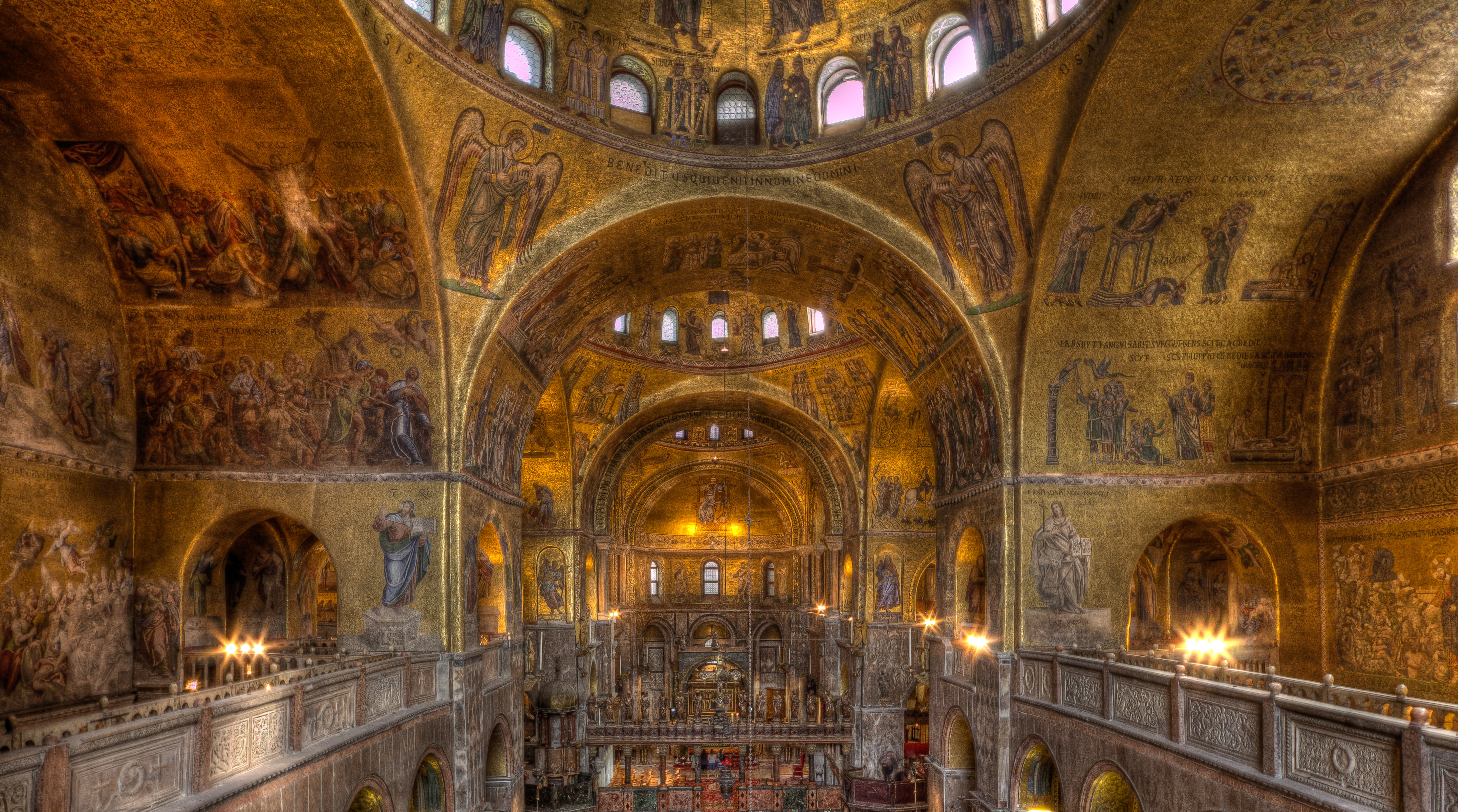 Интерьер собора св. Марка в Венеции